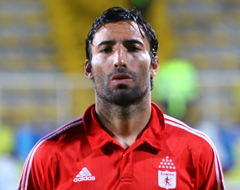 Jugando para América de Cali